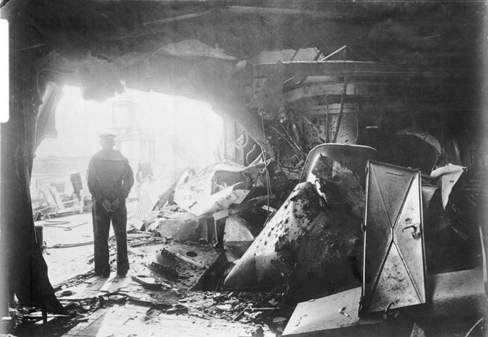 Panzerkreuzer Derfflinger - Gefechtsschäden Panzerkreuzer Derfflinger, Stapellauf: 14.6.1913, Gefechtsschäden